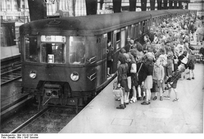 ADN-ZB/Donath Berlin 1947 Täglich bringen Sonderzüge der S-Bahn Berliner Kinder an die Ferienplätze in die Umgebung der Stadt (S-Bahnhof Friedrichstrasse).